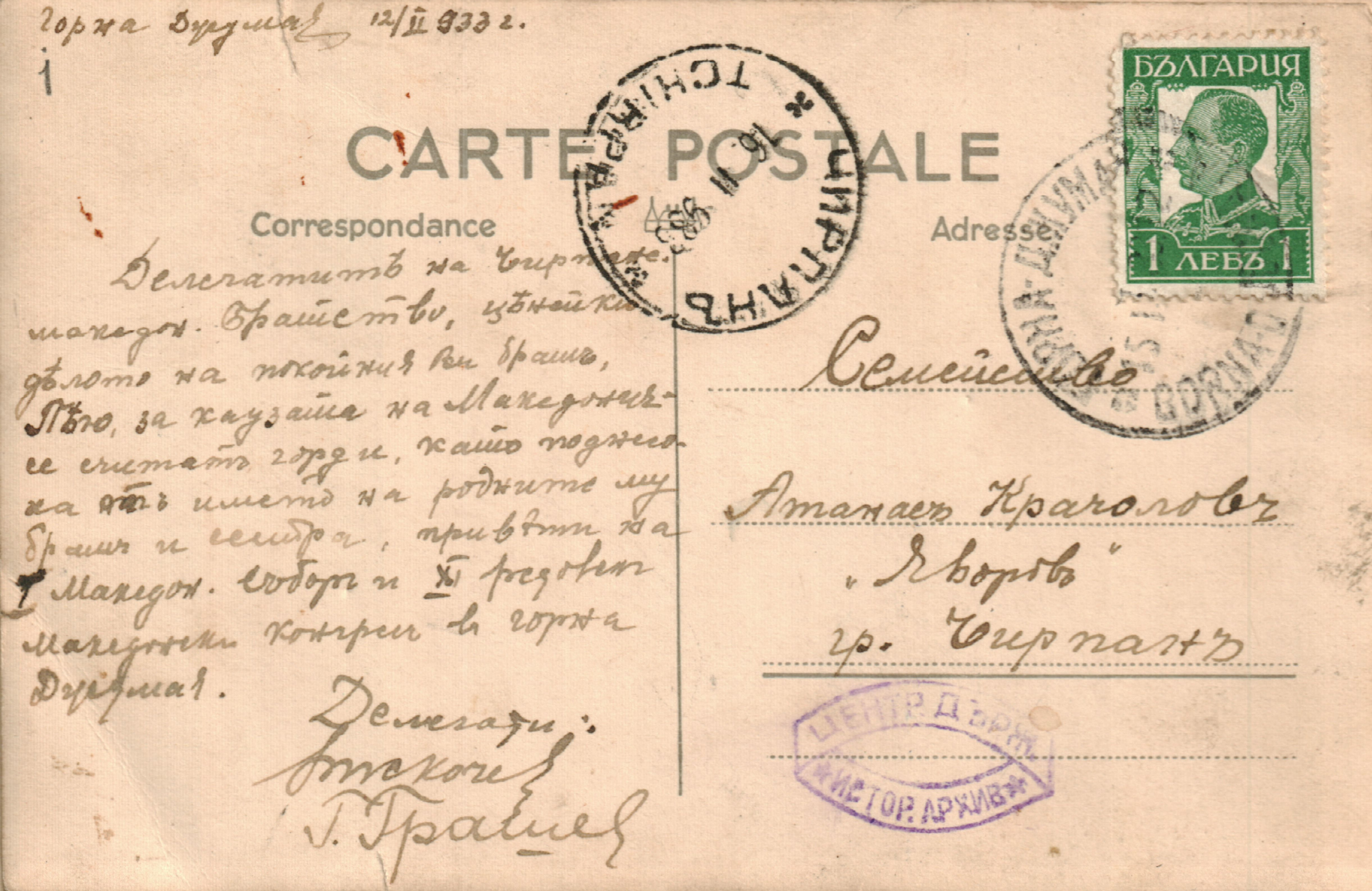 Снимка на участници в XI редовен Македонски конгрес. Горна Джумая, 12 февруари 1933 г.